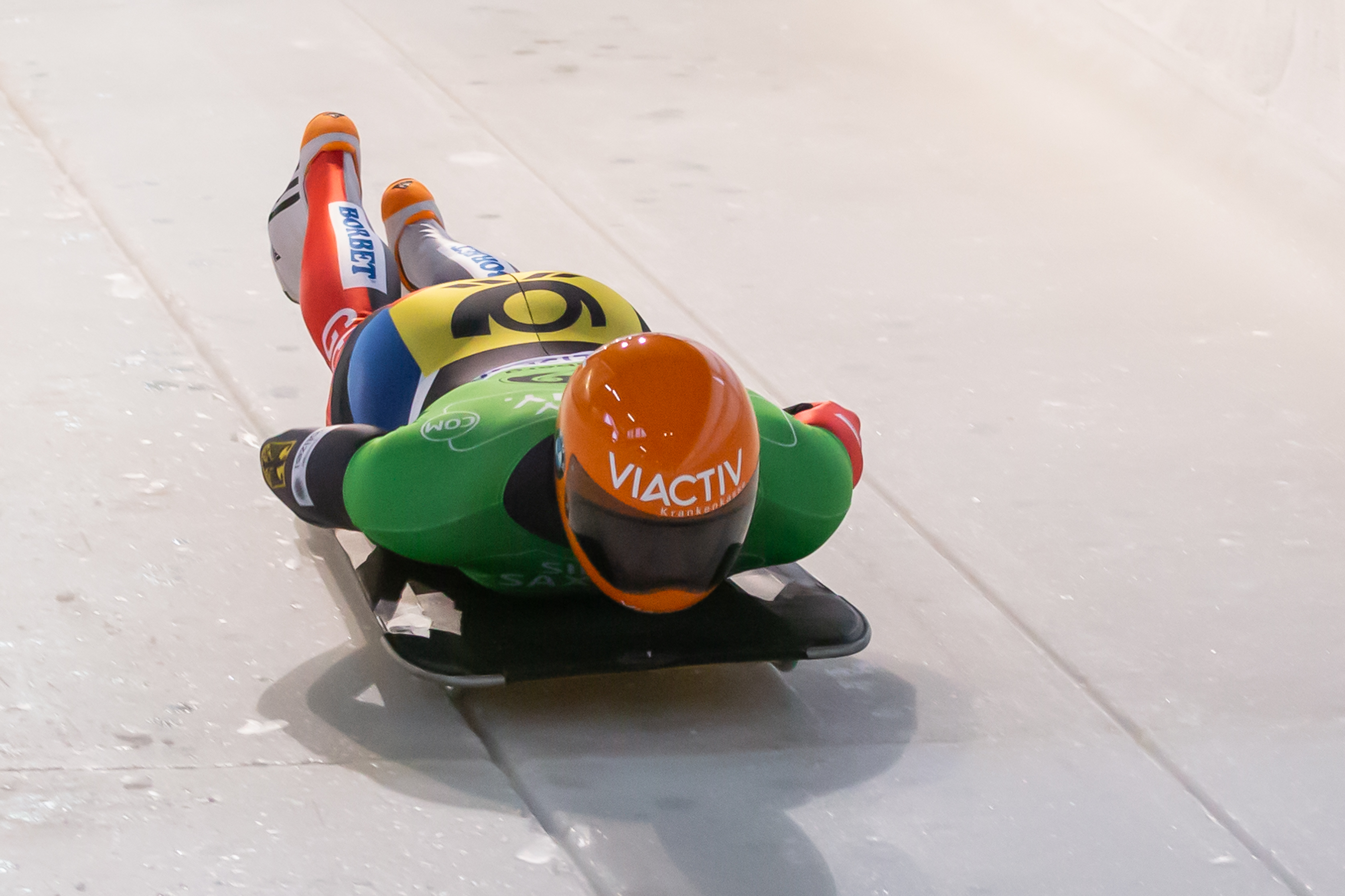 Deutsche Meisterschaften Skeleton; Christopher Grotheer (BRC Thüringen) beim Start